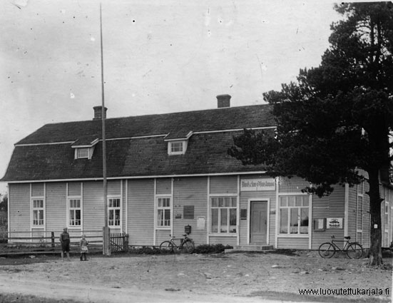 Vuokselan osuuskaupan Uudenkylän myymälä ennen talvisotaa.